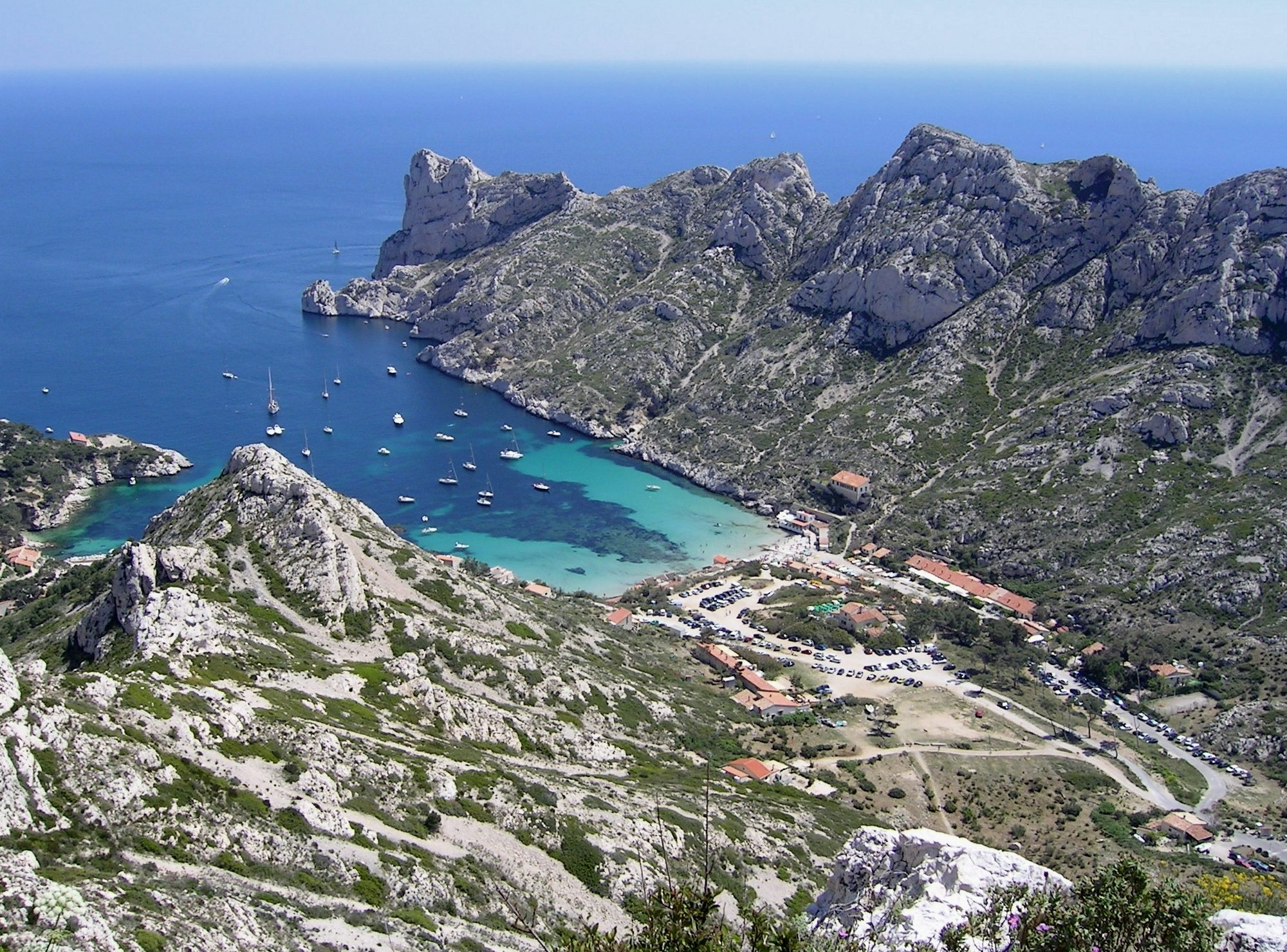 Description: The Calanque de Sormiou near Marseille, France. Photo taken from the top of a nearby hill. Source: own picture (Thomas Rosenau, User:Pumbaa80) Date: see metadata section below Other versions: Image:Calanque de Sormiou 2.jpg, Image:Calanque de Sormiou 3.jpg, Image:Calanque de Sormiou 4.jpg Description: Calanque de Sormiou près de Marseille. Source: Image prise par Thomas Rosenau (User:Pumbaa80) Date: voir ci-dessous (section «Metadata») Autres versions: Image:Calanque de Sormiou 2.jpg, Image:Calanque de Sormiou 3.jpg, Image:Calanque de Sormiou 4.jpg